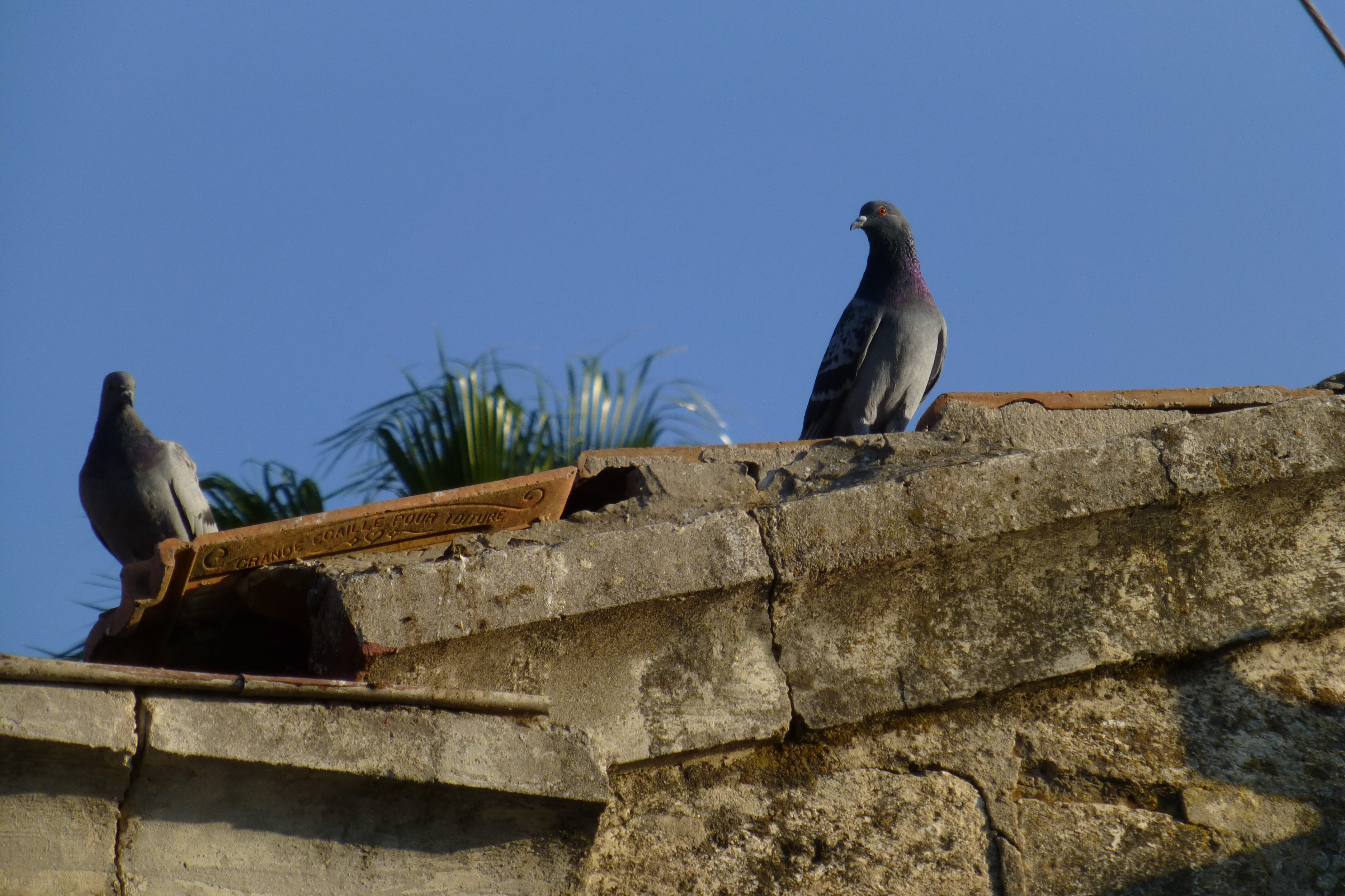 ראשוני המתיישבים באתר היישוב אלוני אבא היו בני הדור השני של תנועת הטמפלרים הגרמנים, אשר הקימו במקום בשנת 1907 מושבה חקלאית קטנה ושמה "ולדהיים".